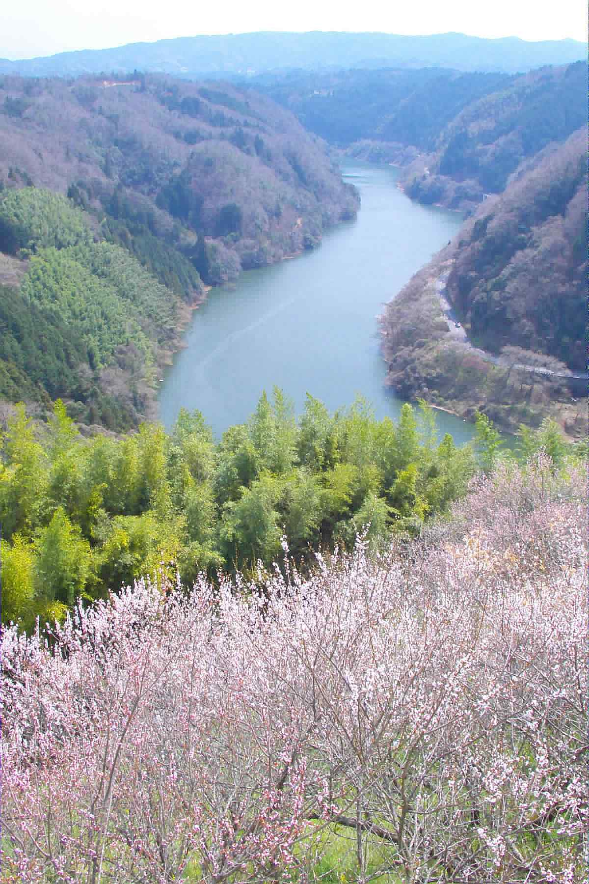 The plum grove of Tsukigase (月ヶ瀬梅林) at Tuskigase-oyama, Nara-shi, Nara-ken, Japan.